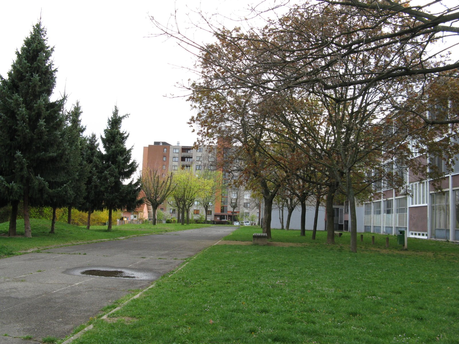 OŠ Slave Klavore